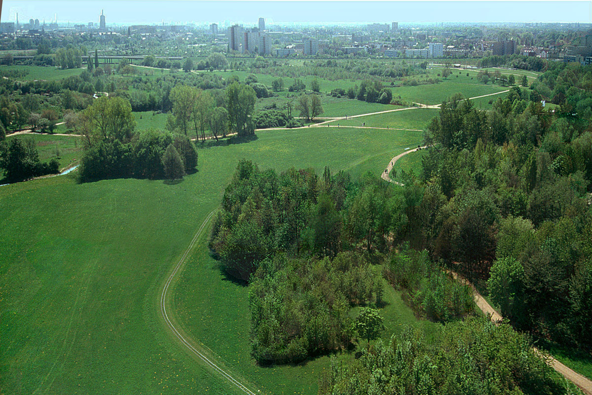 Aufnahme vom BUGA-Turm in Richtung Süden. Junge ergänzen ältere Anpflanzungen.